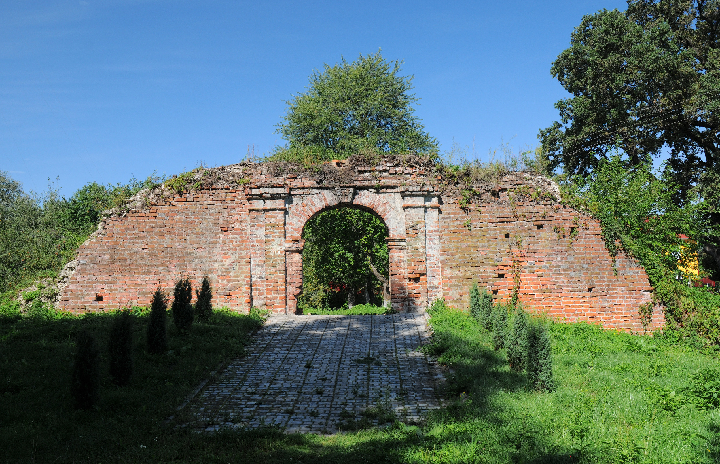 Руїни замку в Маріямполі